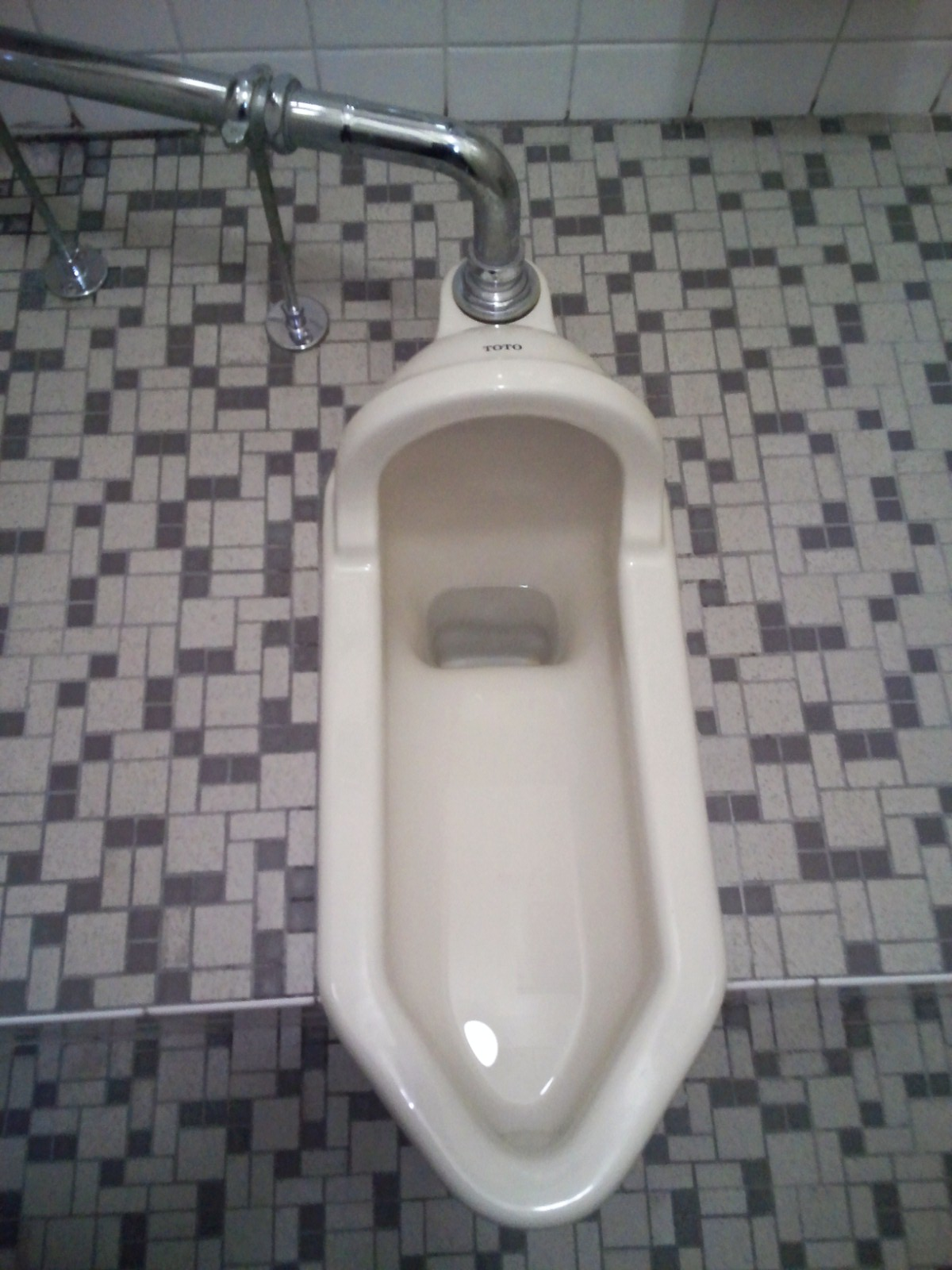 TOTO C375AV #R54